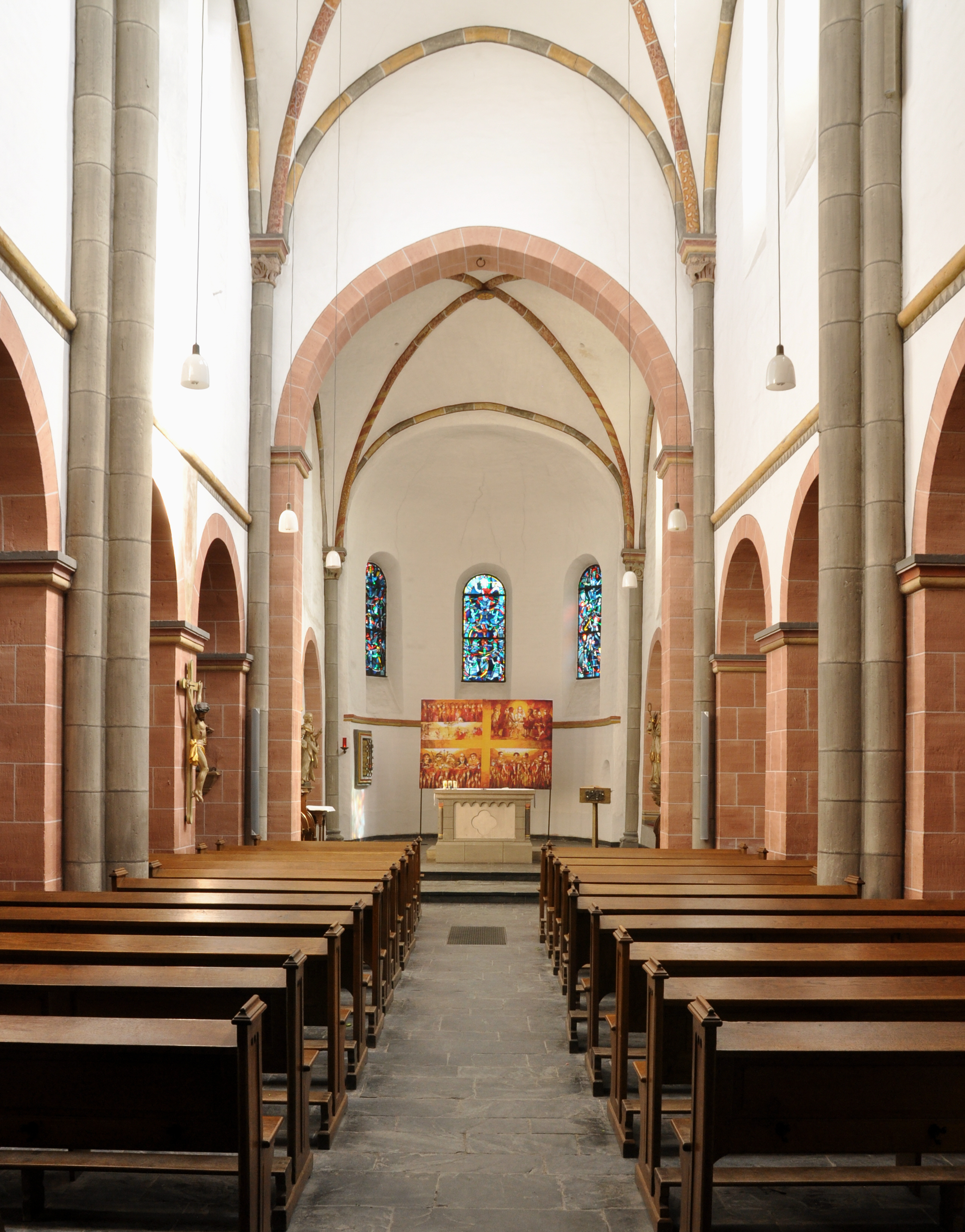 Blick durch das Langhaus der katholischen Pfarrkirche St. Dionysius in Duisburg-Mündelheim in Richtung Osten